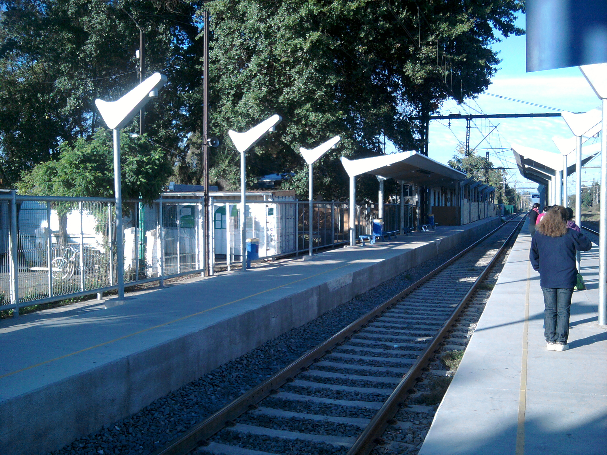 Estación de ferrocarriles de Rengo